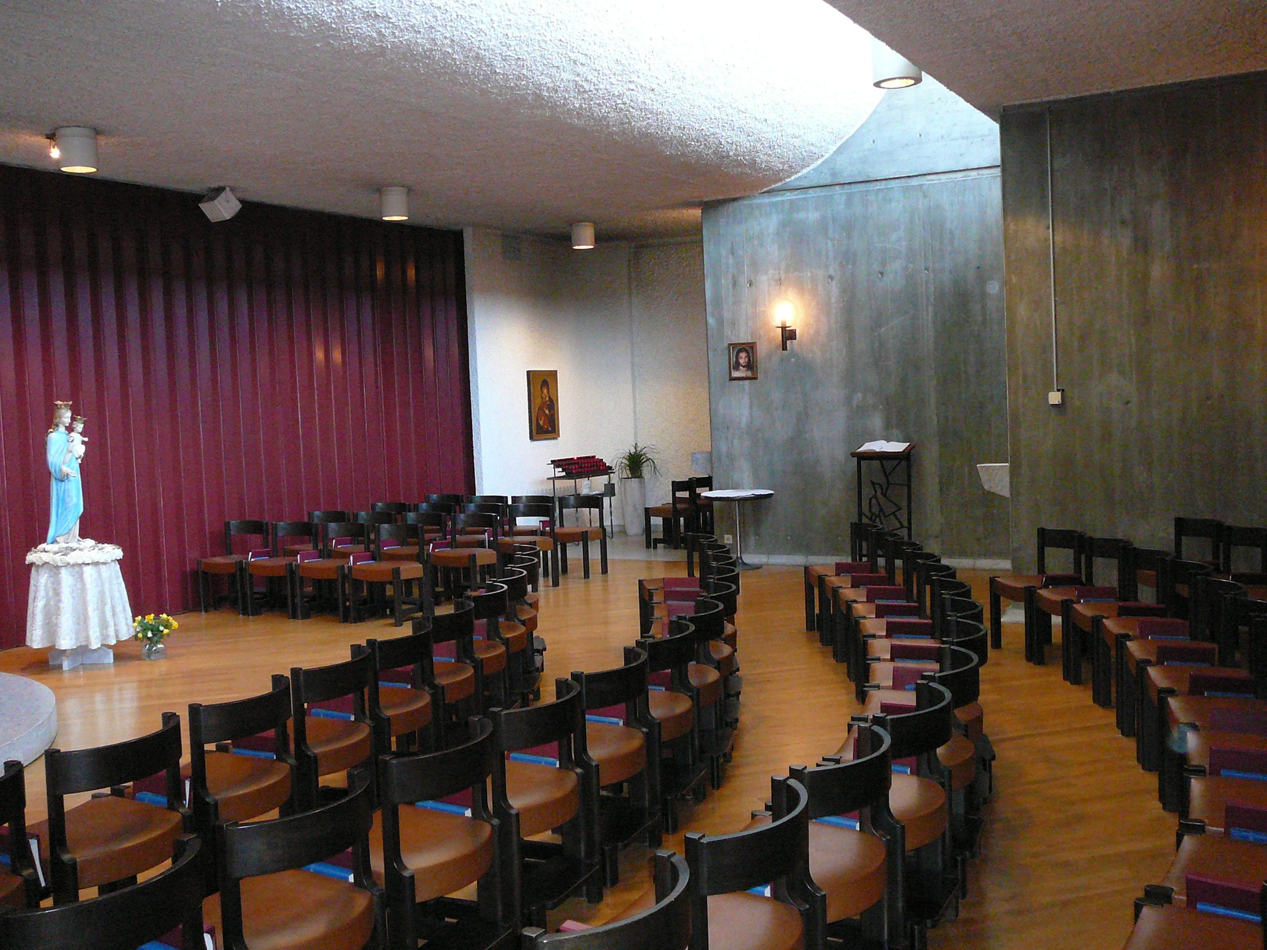 Römisch-katholische Kirche St. Mauritius Regensdorf, Kapelle